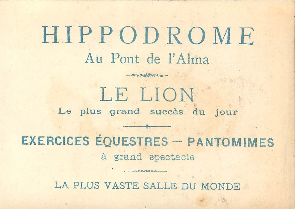 Verso du chromo publicitaire de l'Hippodrome au pont de l'Alma.